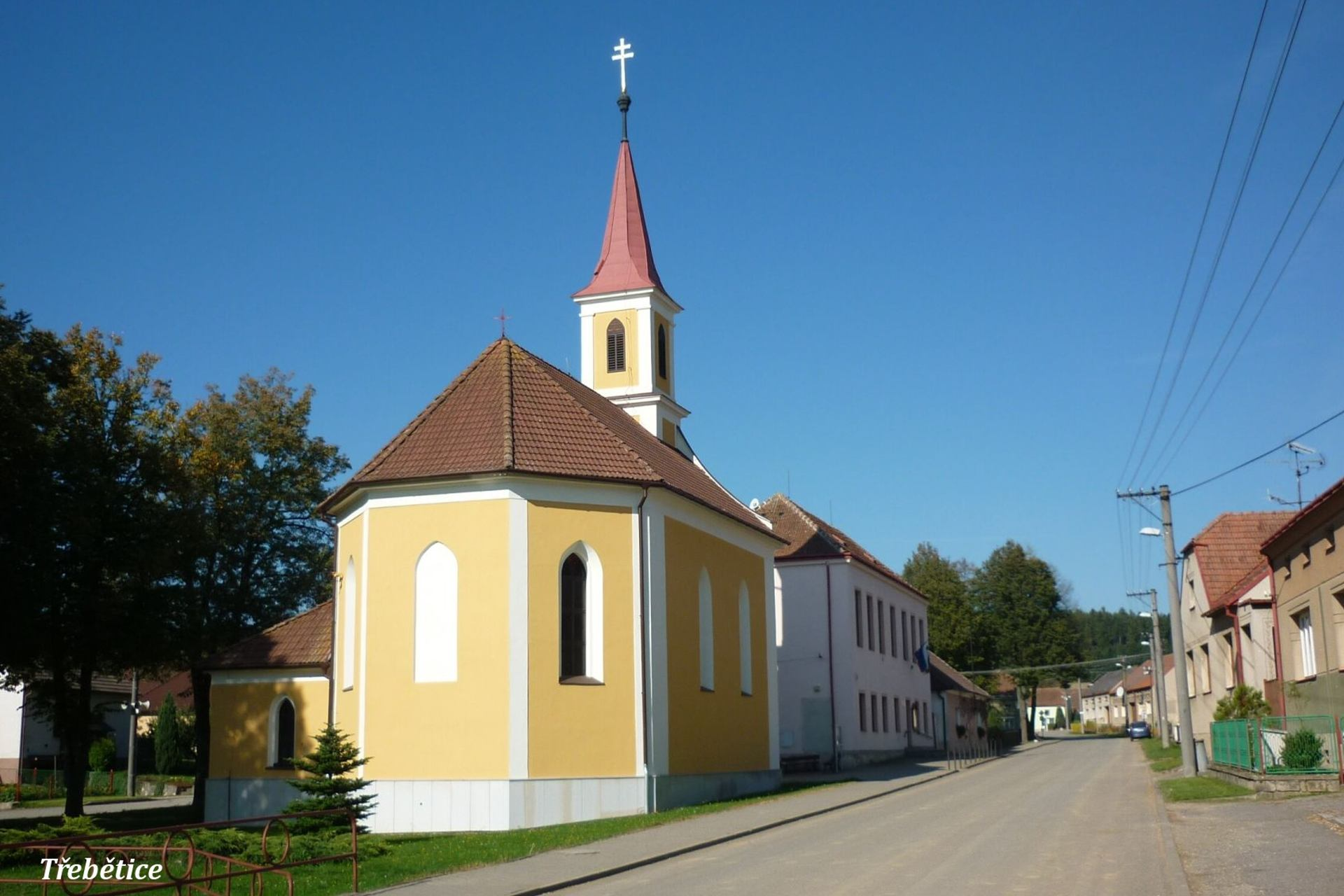 Kostel sv. Václava v Třeběticích